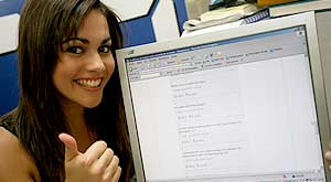 La periodista española Lara Álvarez.